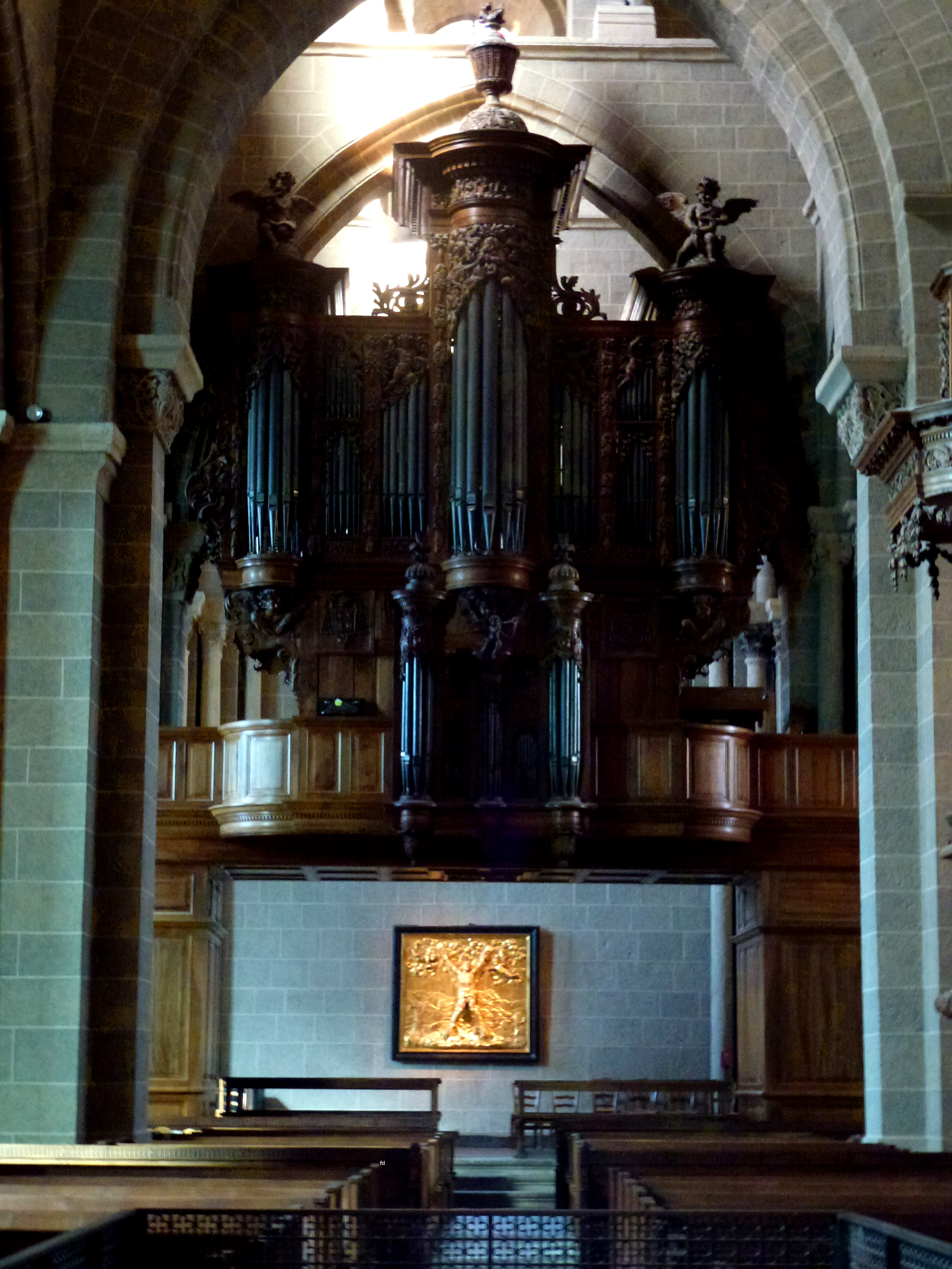 Le Puy Kathedrale Innenraum